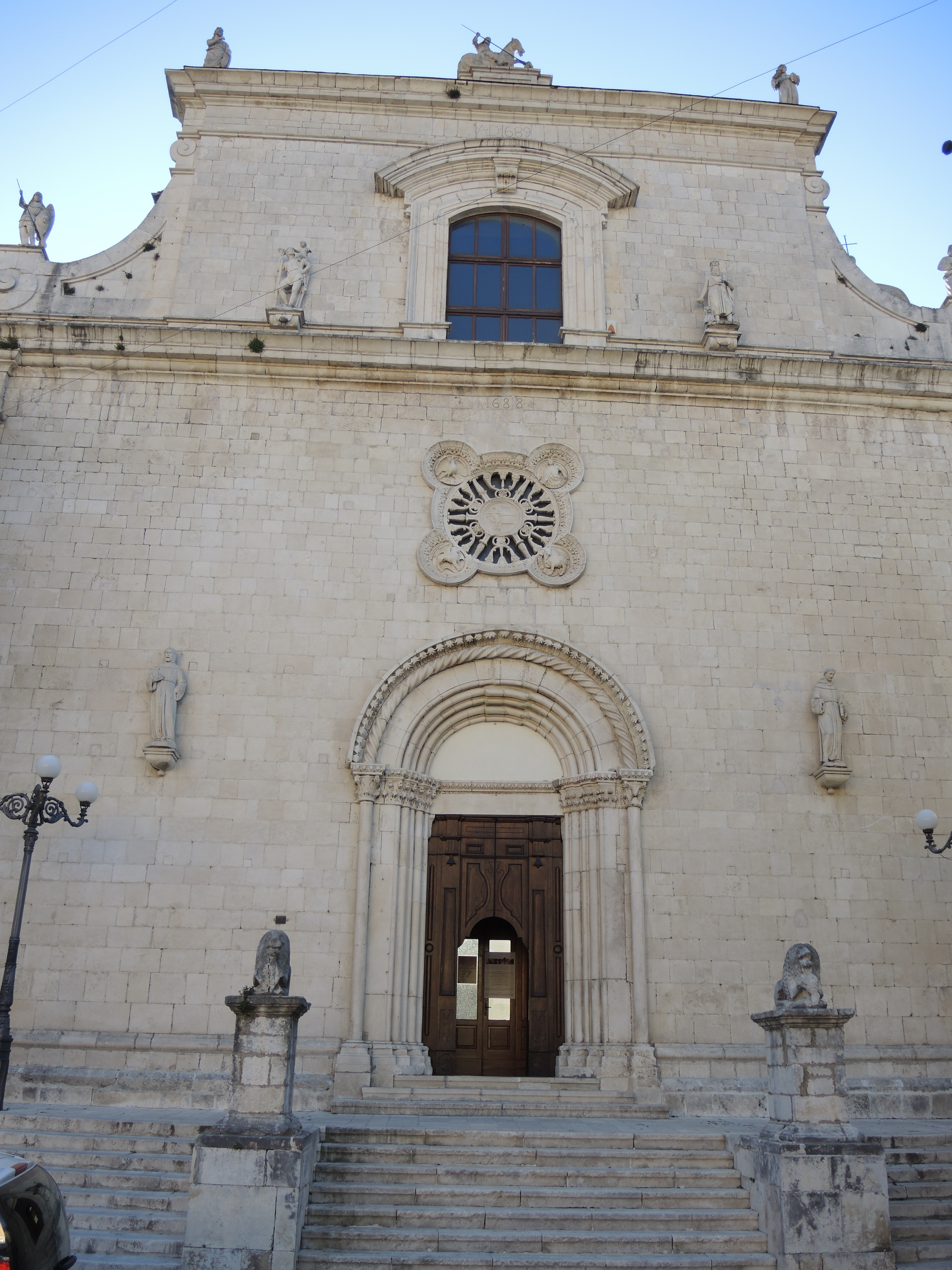 Popoli (PE): Chiesa di San Francesco